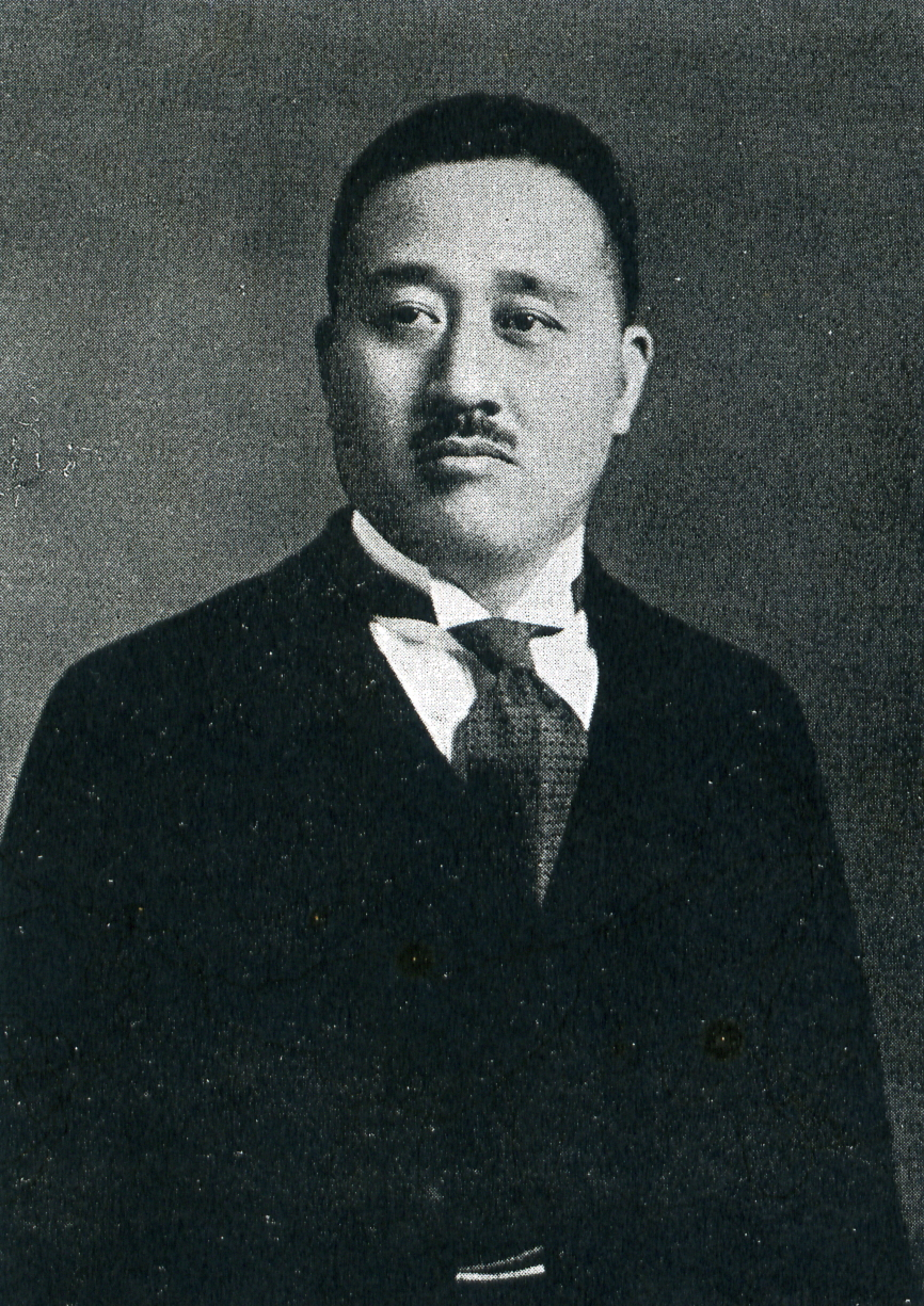 この写真は、山口義一（1888-1935）の写真です。